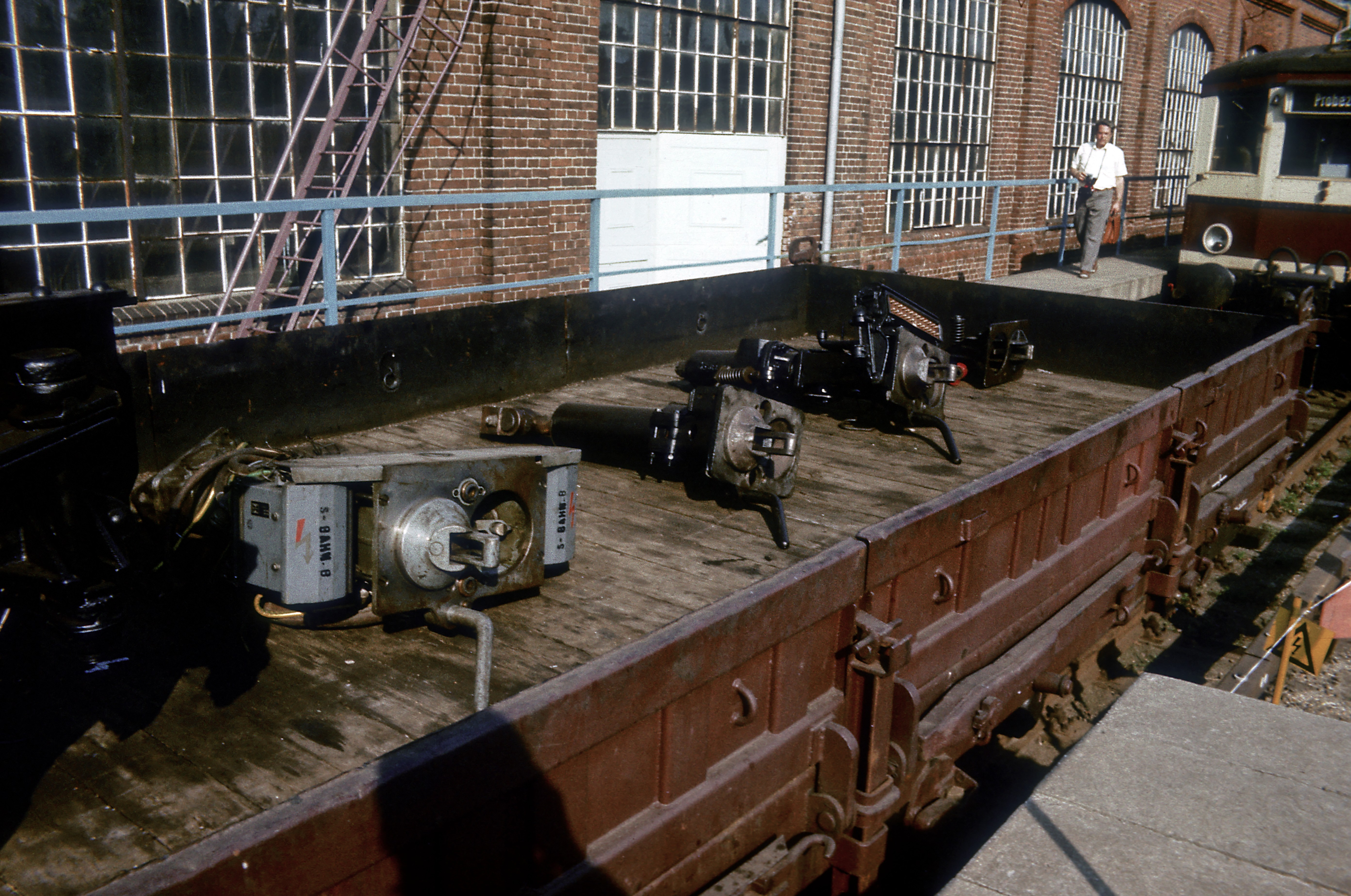 Scharfenbergkupplungen der S-Bahn Berlin von links: für die BR 270 mit seitlichen Kontakten für die Altbaureihen 275 und 276 ohne Kontaktaufsatz mit »Klavier« für die Baureihen 277 alt, 276.1 und 277 Reko in den Zughaken der Schraubenkupplung einzuhängende Übergangskupplung Fahrzeugausstellung 75 Jahre Bw Grünau